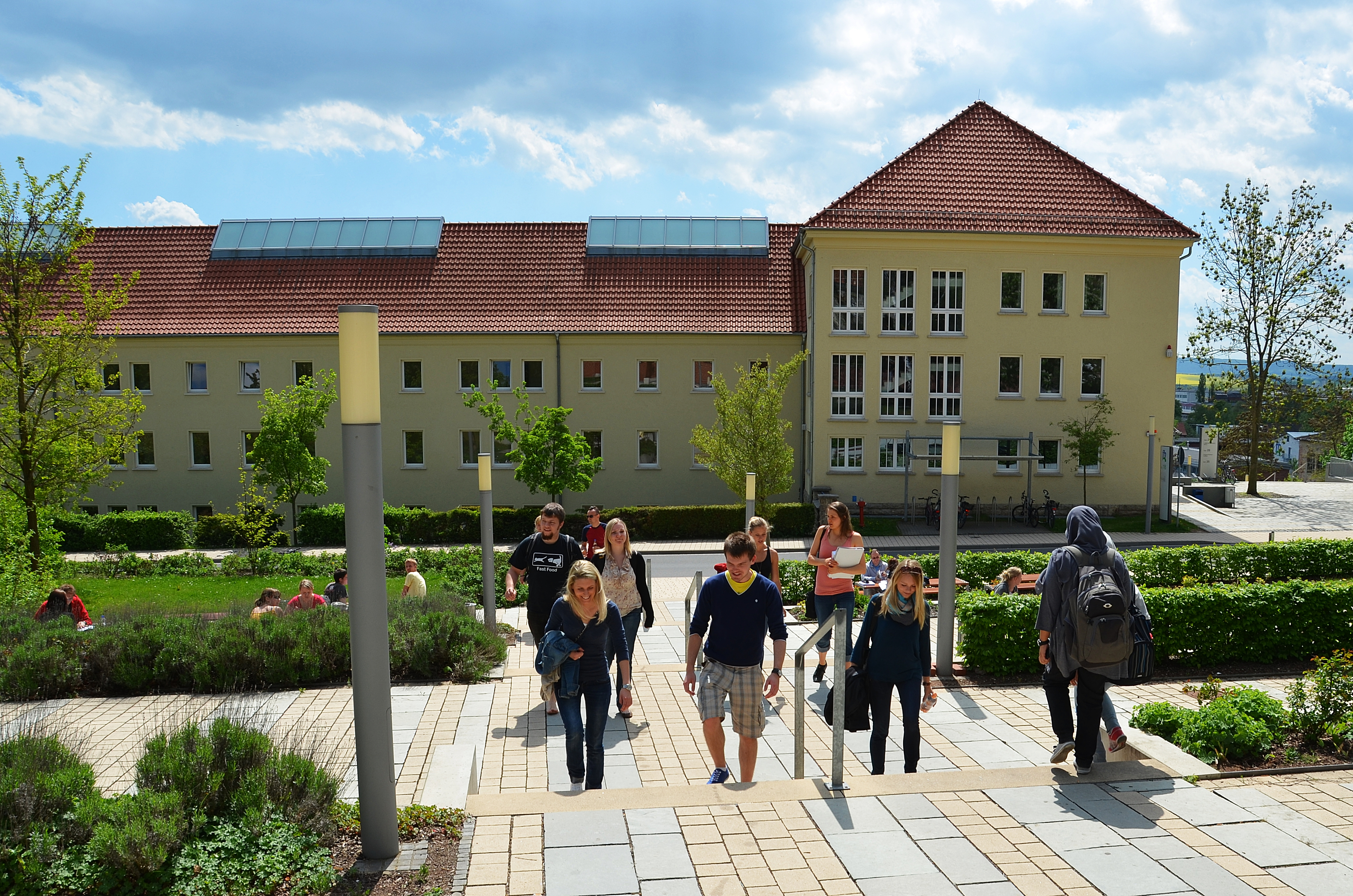 Blick auf das Haus 18 und die Bibliothek der FH Nordhausen aus Sicht des Audimax